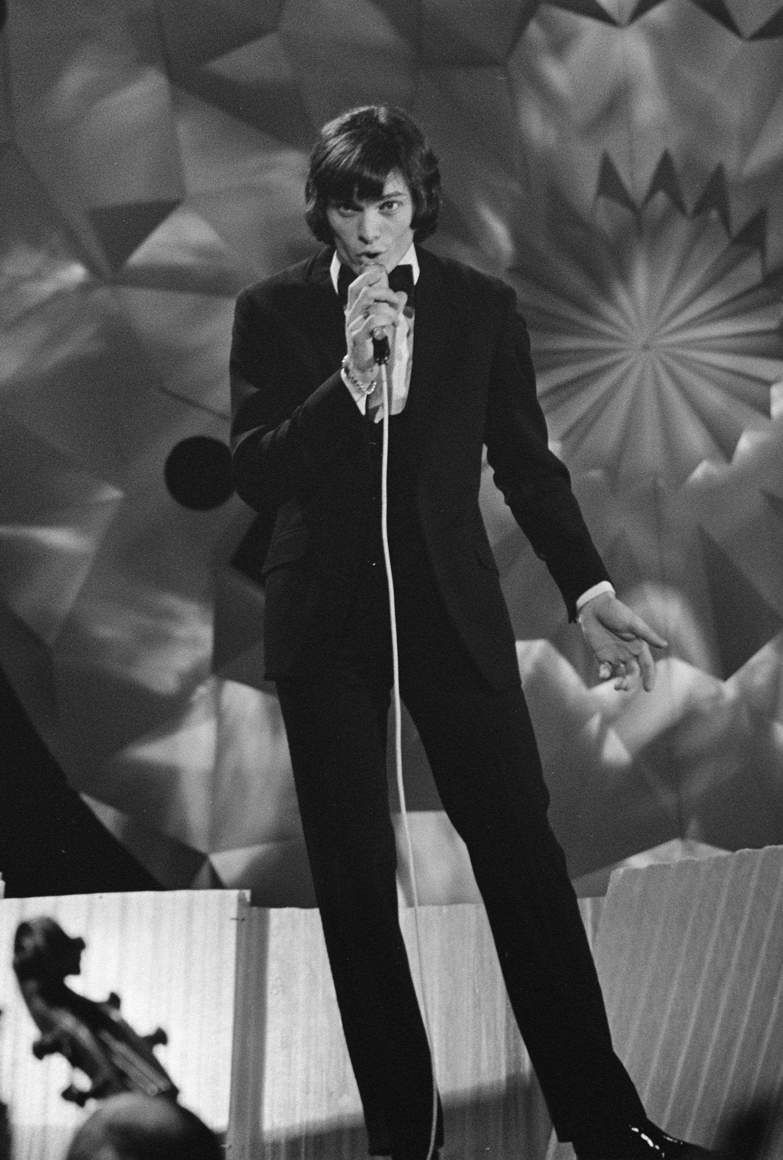 Collectie / Archief : Fotocollectie Anefo Reportage / Serie : [ onbekend ] Beschrijving : Nationale finale Eurovisie Songfestival in Nederlands Congresgebouw in Den Haag. Ben Cramer This file has been extracted from another file: Nationale finale Eurovisie Songfestival in Nederlands Congresgebouw in Den Haag., Bestanddeelnr 923-2486.jpg Datum : 11 februari 1970 Locatie : Den Haag, Zuid-Holland Trefwoorden : finales, songfestivals, songfestivals, zangers Persoonsnaam : Cramer, Ben Instellingsnaam : Congresgebouw, Eurovisie Song Festival Fotograaf : Mieremet, Rob / Anefo Auteursrechthebbende : Nationaal Archief Materiaalsoort : Negatief (zwart/wit) Nummer archiefinventaris : bekijk toegang 2.24.01.05 Bestanddeelnummer : 923-2486